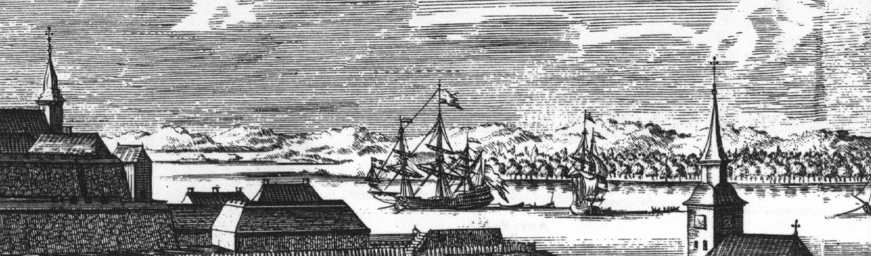 Getterön. Utsnitt ur kopparsticket "Wardberg" i Suecia antiqua et hodierna.